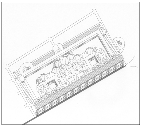 Carthage, Thermes d'Antonin, Perspective de l'établissement des bains et de l'esplanade, J. Vérité, 2017.